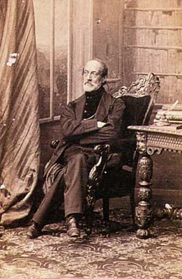 Foto di Giuseppe Mazzini (1805—1872) dal Fondo Comandini, Biblioteca Malatestiana.